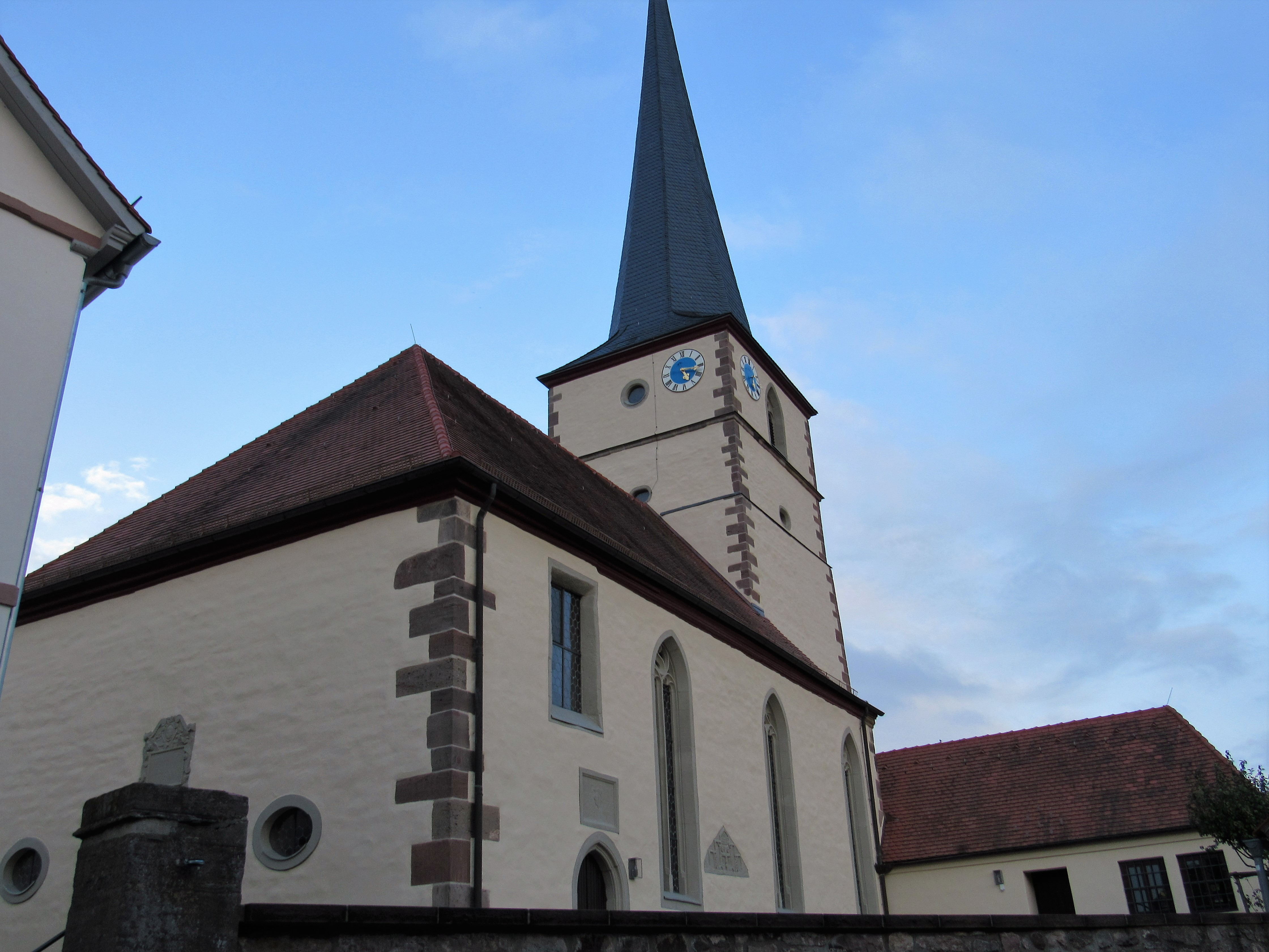 Kirche von Wegfurt, verbesserte Aufnahme, Abschnitt oben unausweichlich durch die Enge!